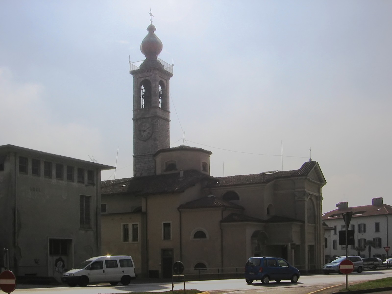 Albino, santuario Madonna del Pianto, Bergamo, Italy